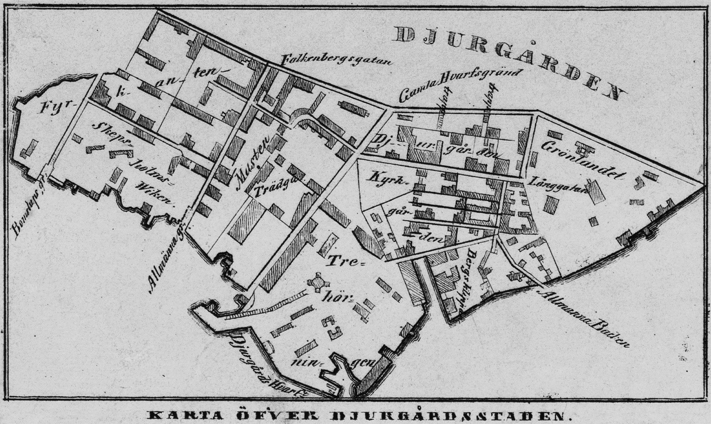 Djurgårdsstaden